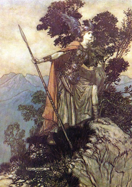 Brünnhilde the Valkyrie